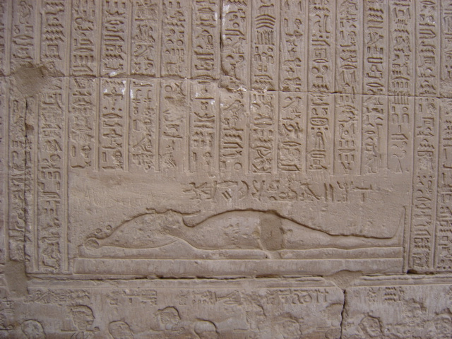 Egypte Denderatempel Osiris